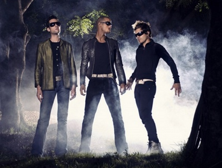 Auro & Clemt contraportada Amaryyosol